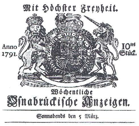 Scan des Kopfes der Ausgabe der "Wöchentliche Osnabrückische Anzeigen" vom 5. März 1791.